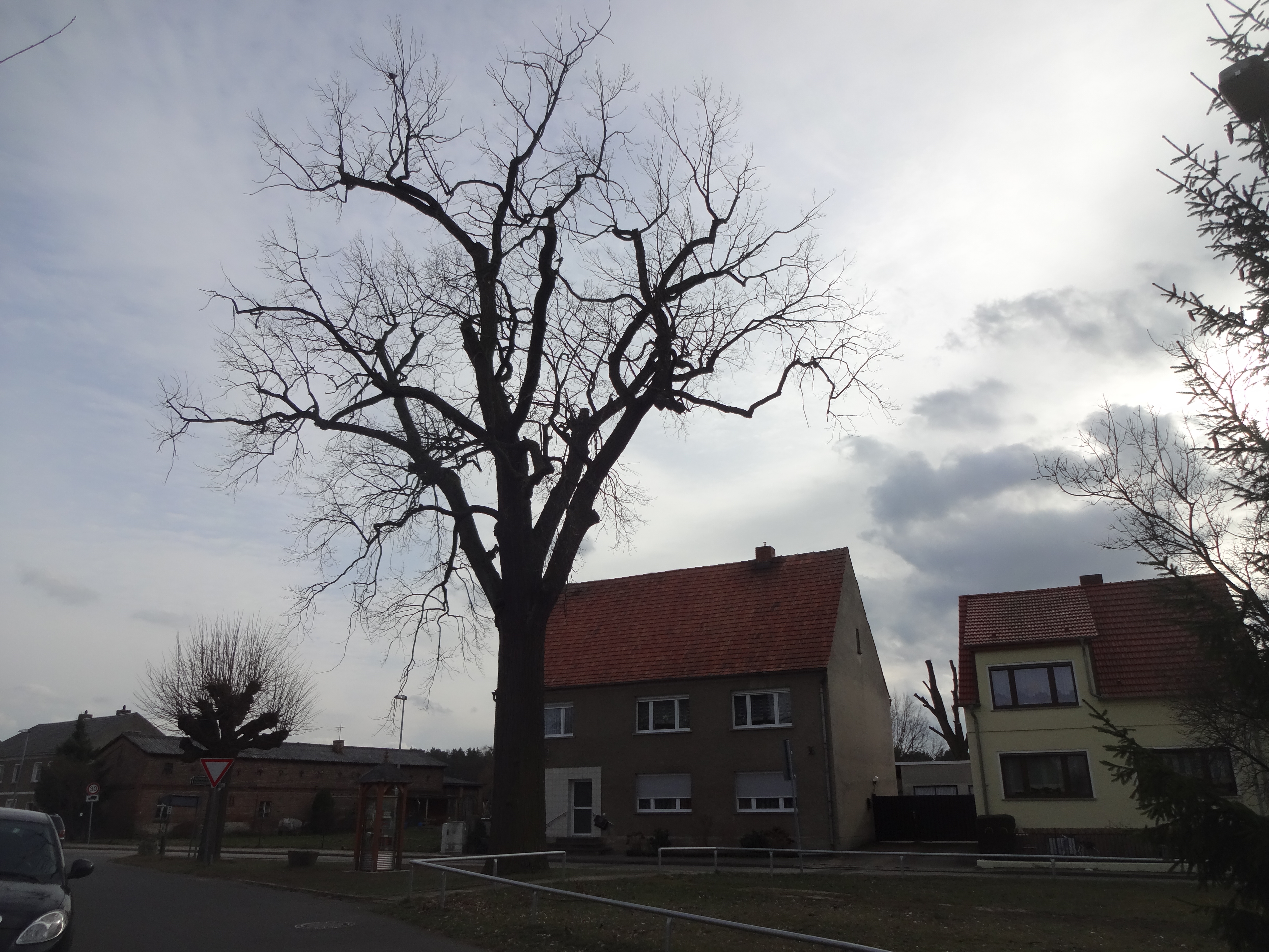 als Naturdenkmal geschützte Friedens-Eiche in Nahmitz